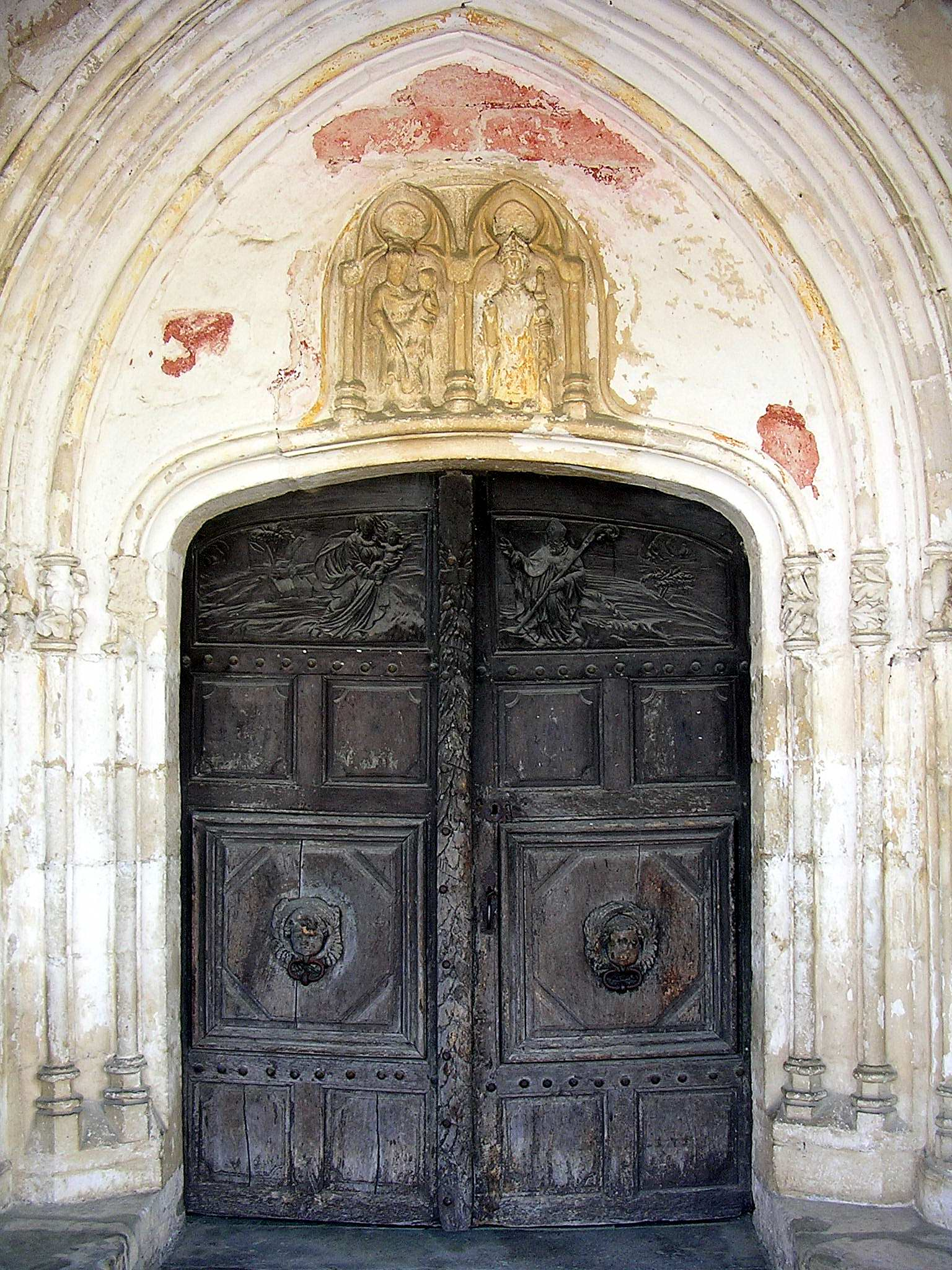 Porte de l'église de Bascons, dans le département des Landes en France